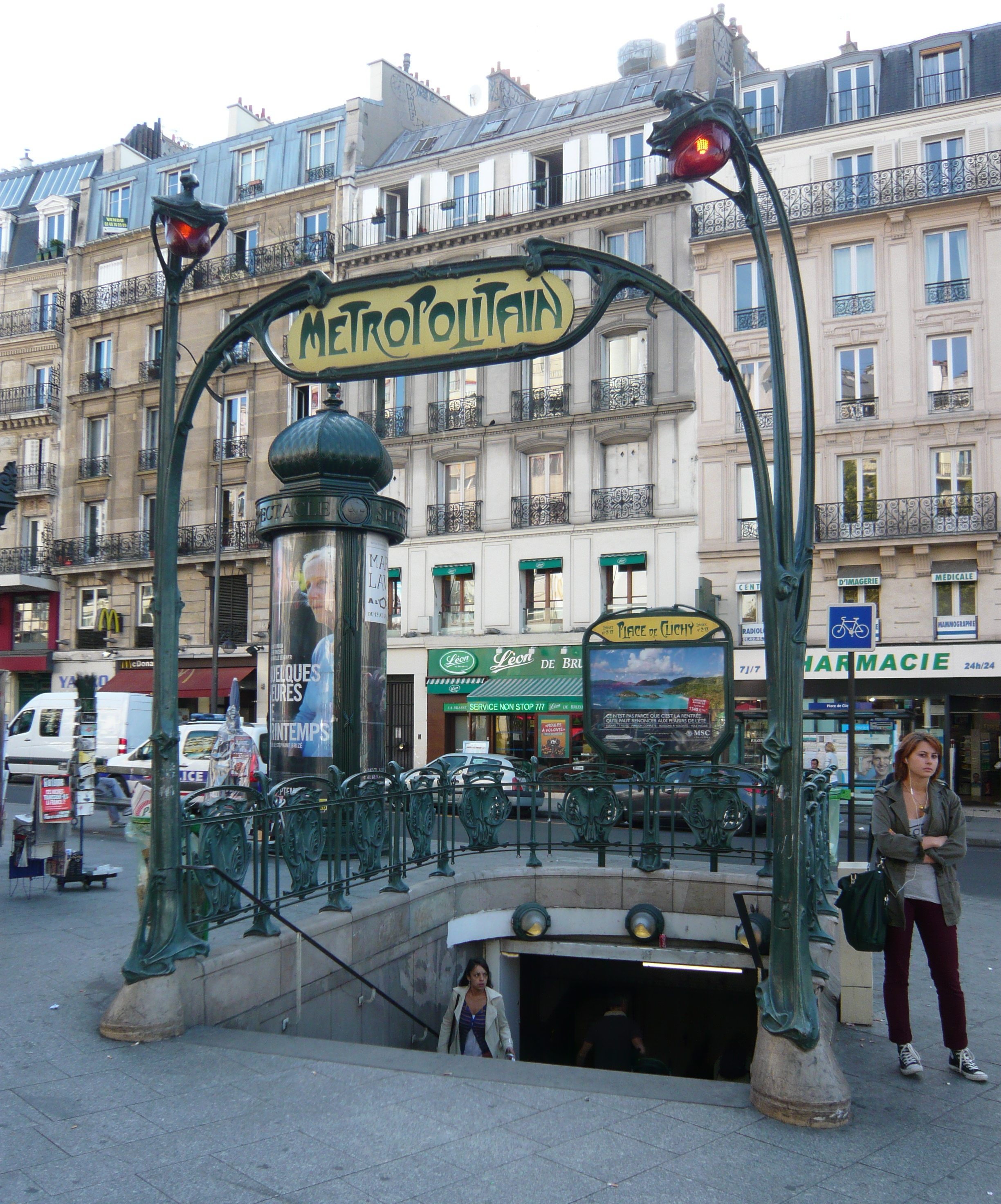 Edicule Guimard Métro Place de Clichy